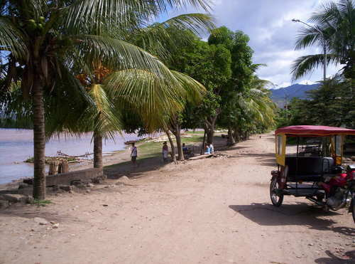 Palmeras en el Puerto Amberes de Juanjui.